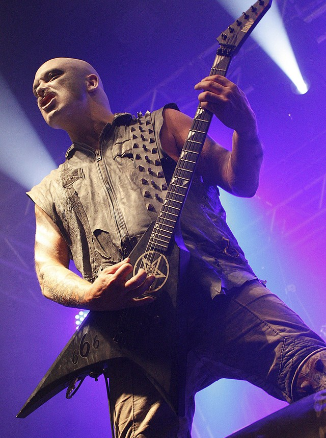 Galder, guitarrista de Dimmu Borgir.